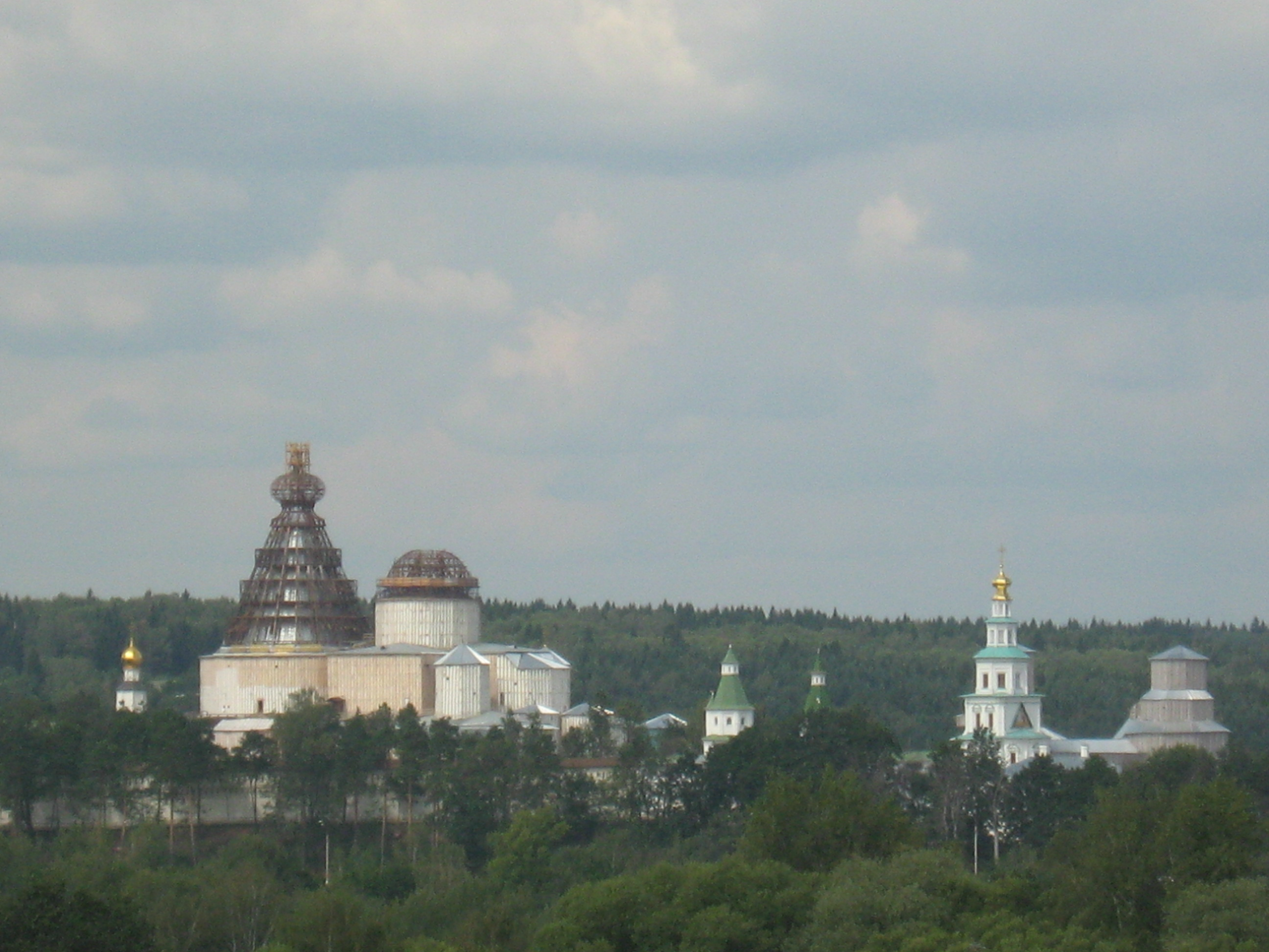 Новоиерусалимский монастырь. Реставрация. 5 августа 2012. Общий план